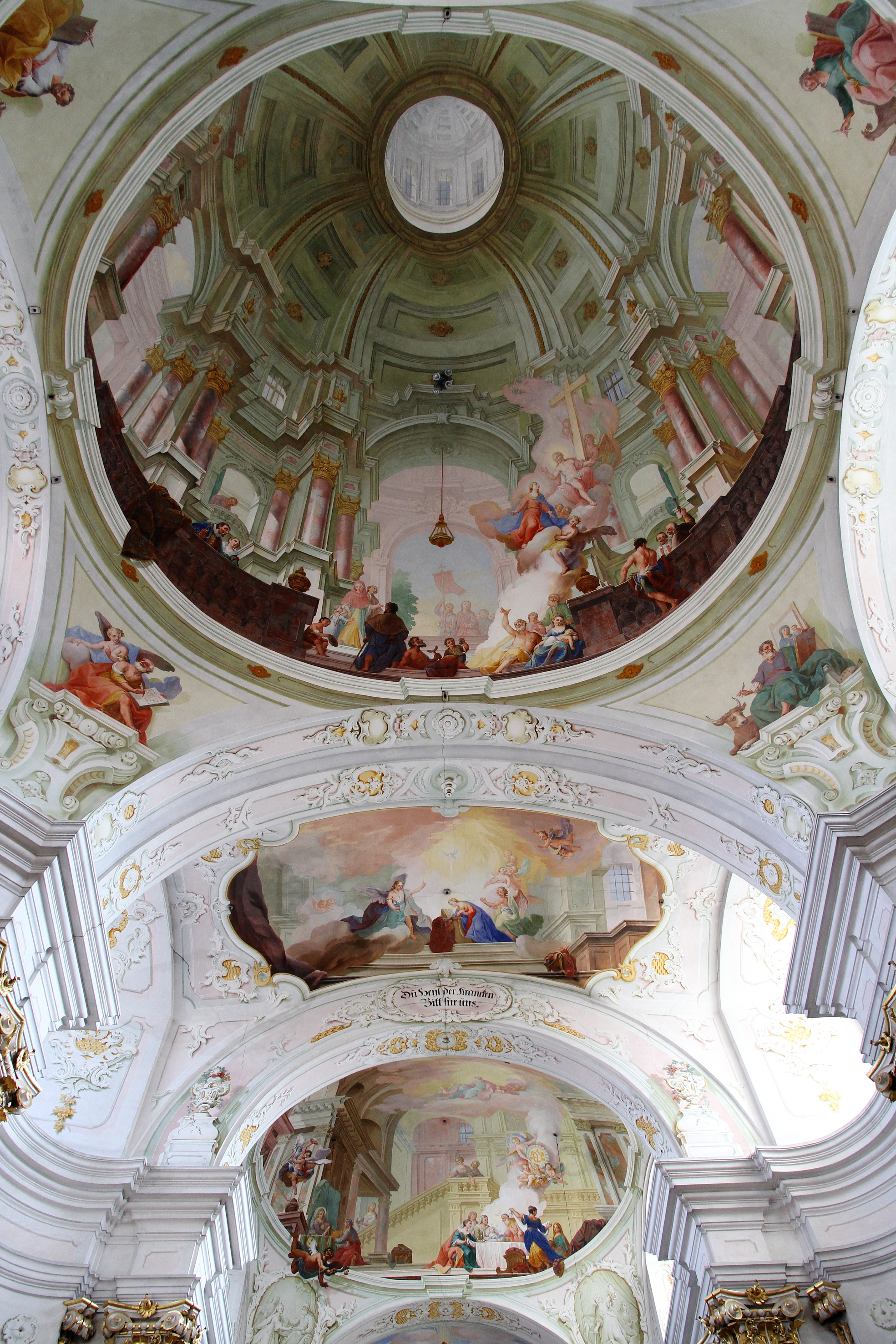 Deckenfresko aus der Werkstatt von Joseph Adam Ritter von Mölk der katholischen Pfarr- und Wallfahrtskirche Mariae Geburt in der niederösterreichischen Ortschaft Maria Langegg. Im Vordergrund die Mittelkuppel mit dem Bildnis „Maria, Heil der Kranken“, anschließend das Deckenfresko des Chorbogens mit dem Titel „Verkündung“ und die Presbyteriumskuppel mit dem Thema „Geburt Mariens“.